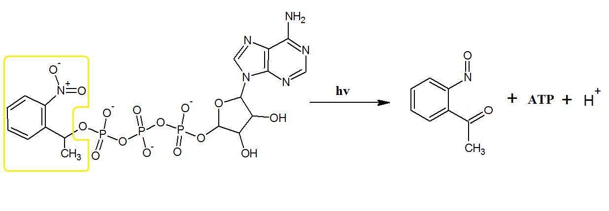 Üldine valgustundliku kaitserühmaga seotud adenosiintrifosfaadi (ATP) fotolüüsi reaktsioon.[1]